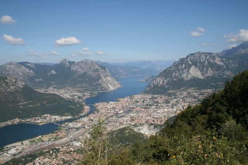 Vista dal Monte Magnodeno: lago di Lecco, Lecco, Lago di Garlate, Corni di Canzo, Valmadrera.